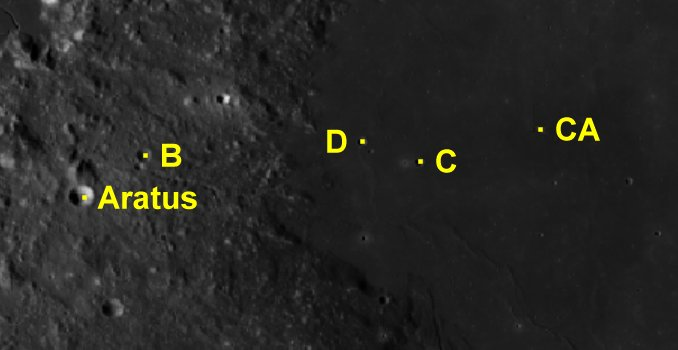 Cráter lunar Aratus. Cráteres satélite. (Imagen LRO)